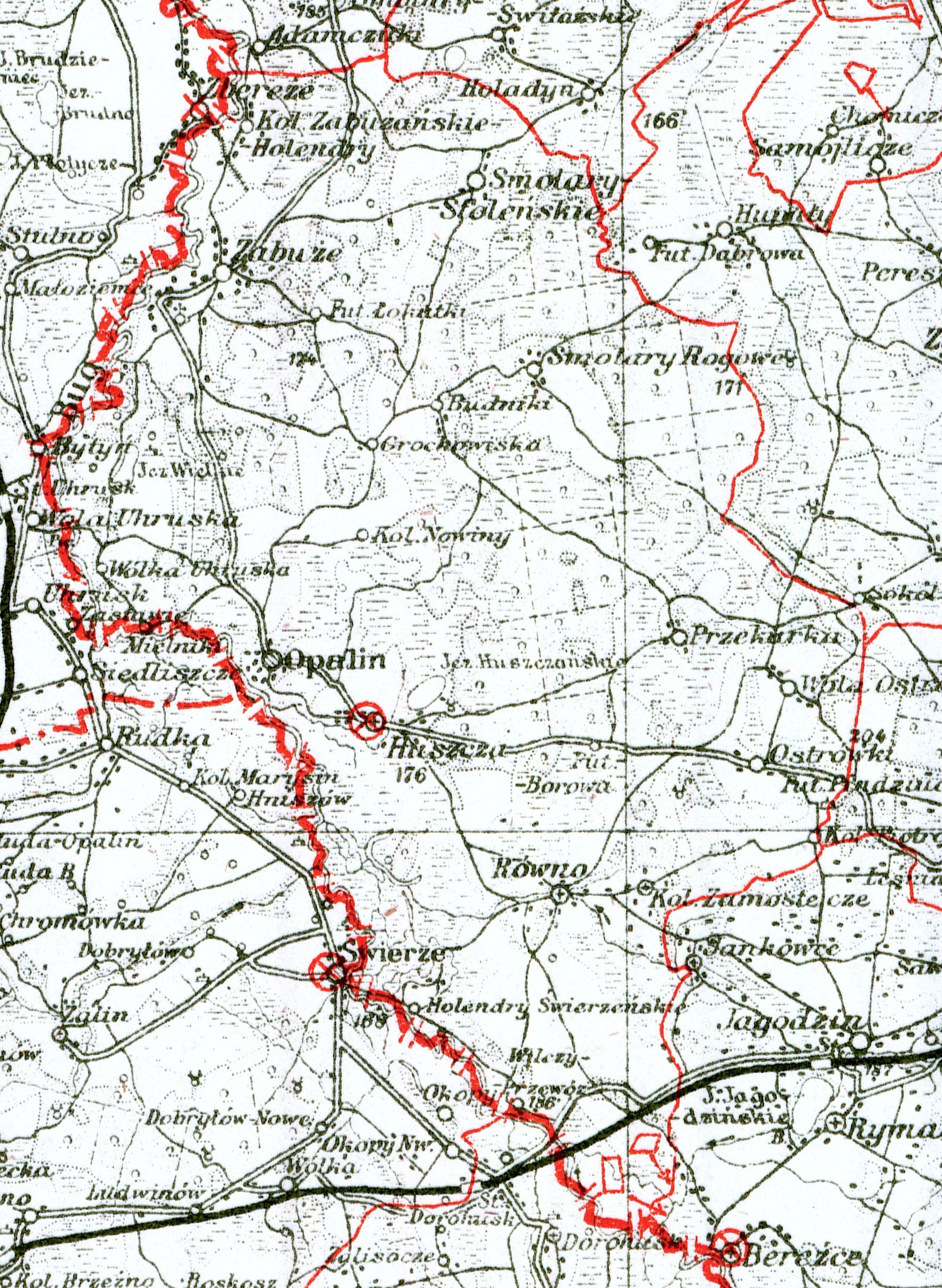 Gmina Huszcza (woj. wołyńskie) na mapie administracyjnej Rzeczypospolitej Polskiej z 1937 r.